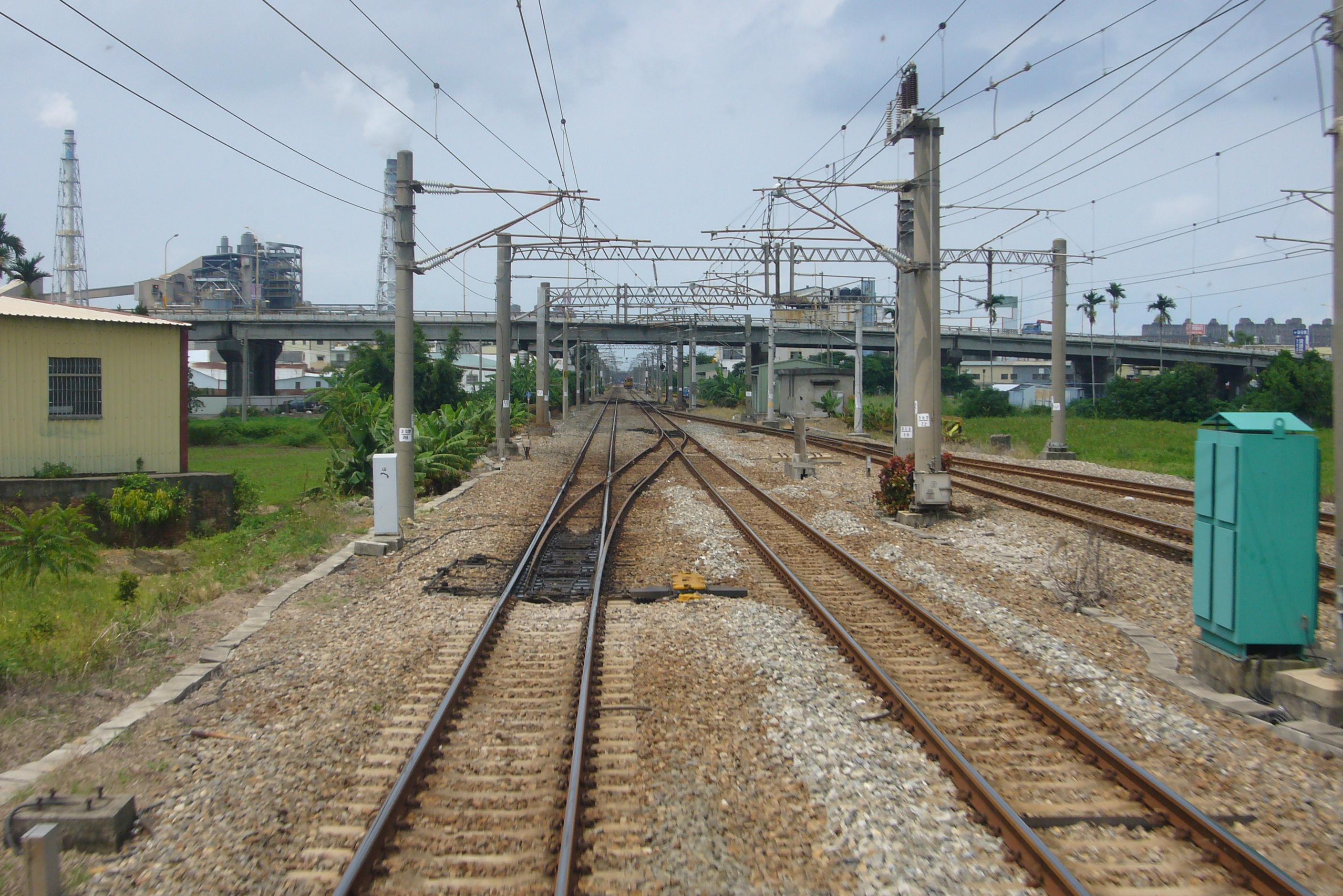 中文（台灣）: 大肚溪南號誌站（DRC1000車上拍攝）